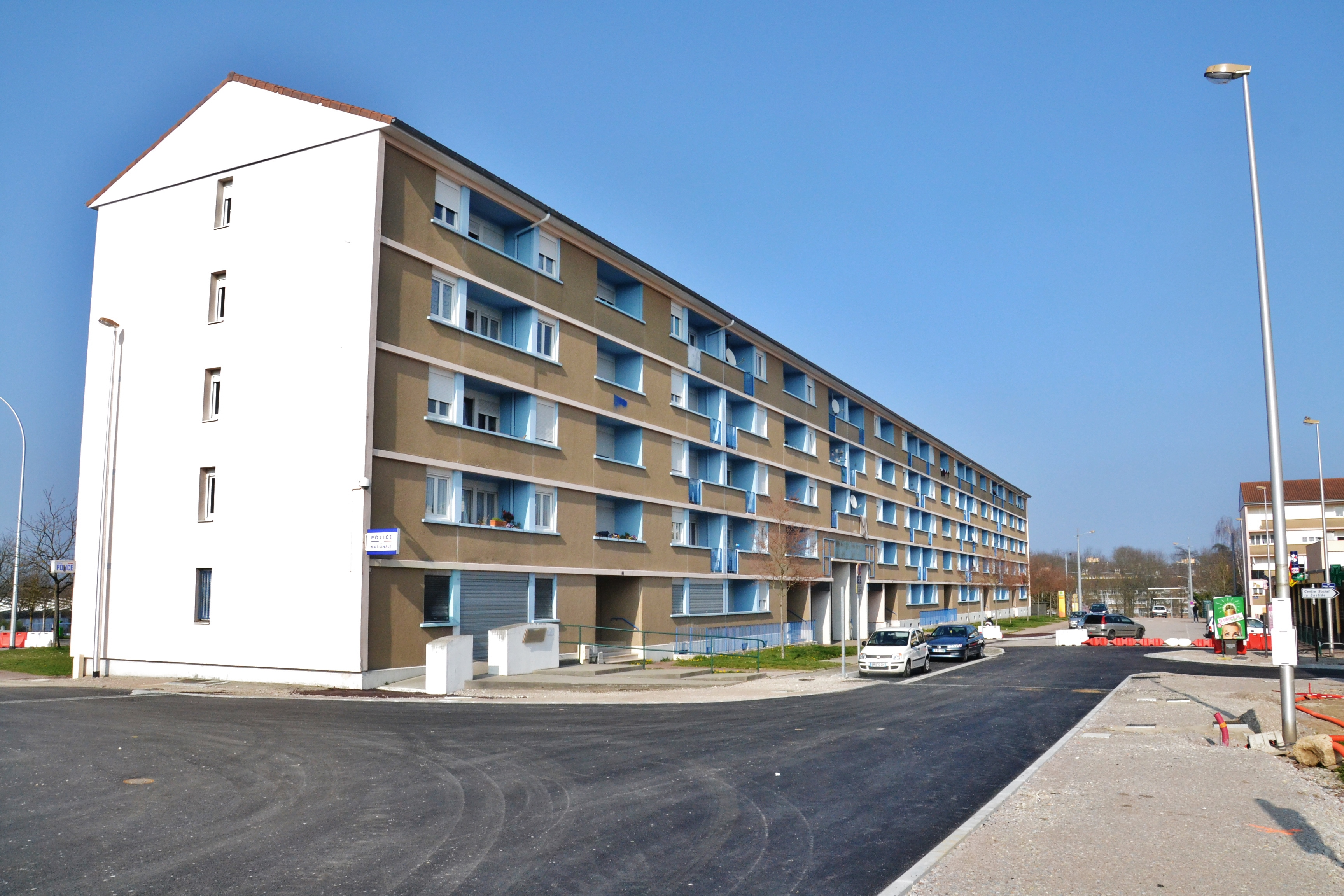 Immeubles de la cité de la Bastide à Limoges (Haute-Vienne, France)